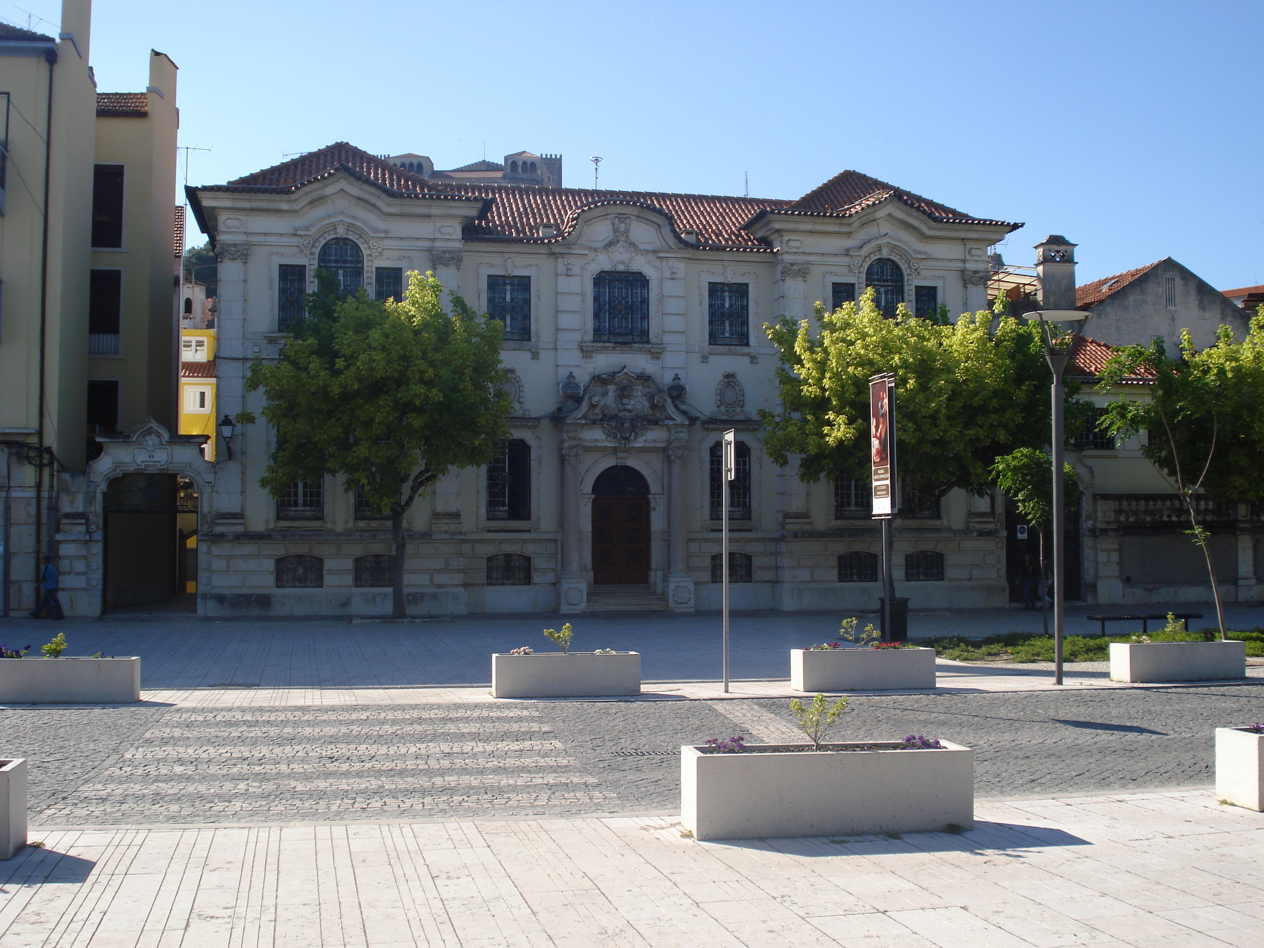 Banco de Portugal, filiação de Leiria